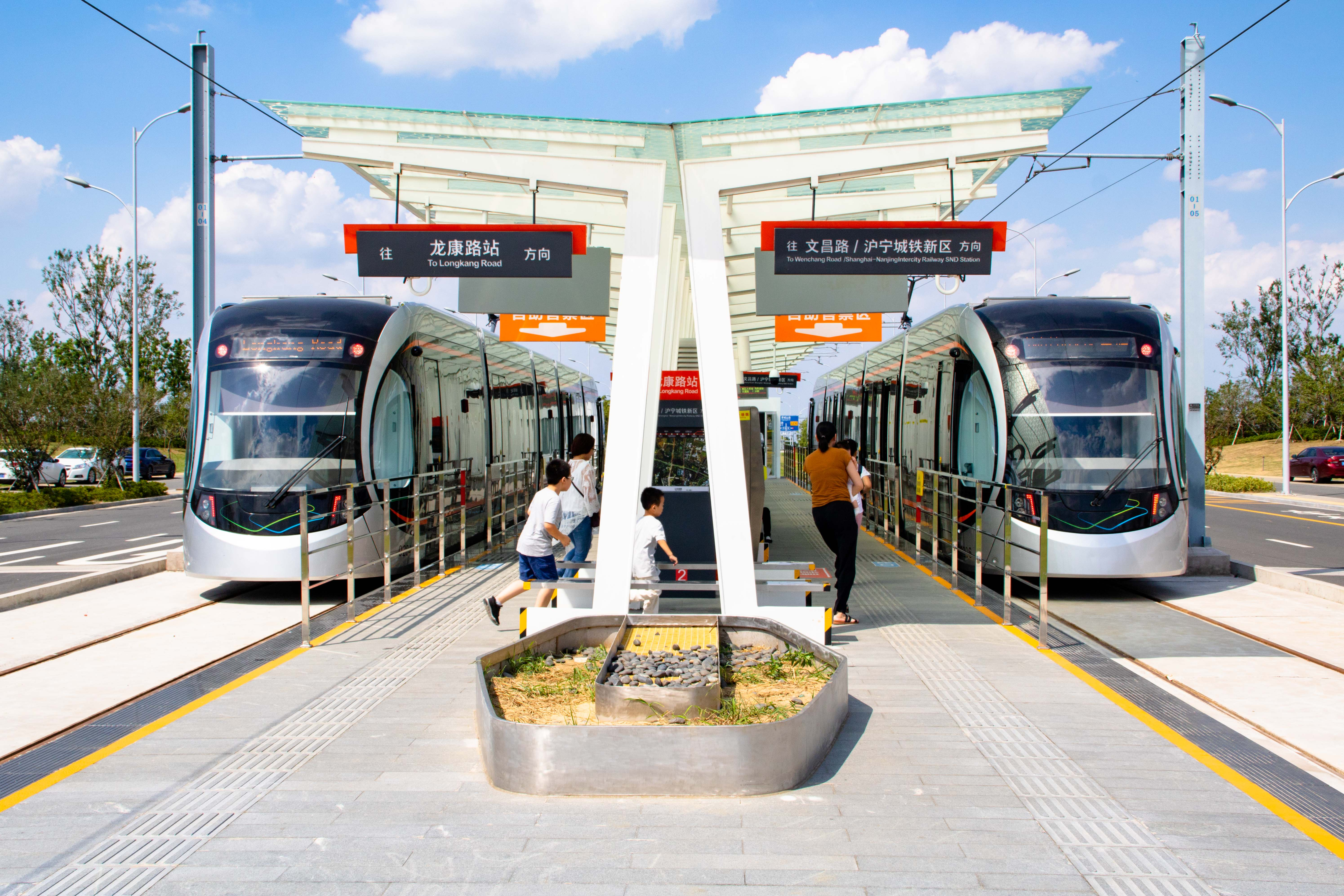 龙康路站有轨电车2号线部分站台